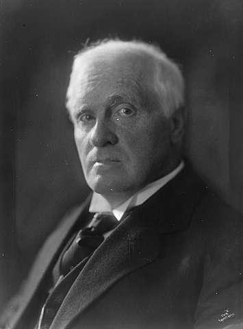 Norwegian actor Bjørn Bjørnson.